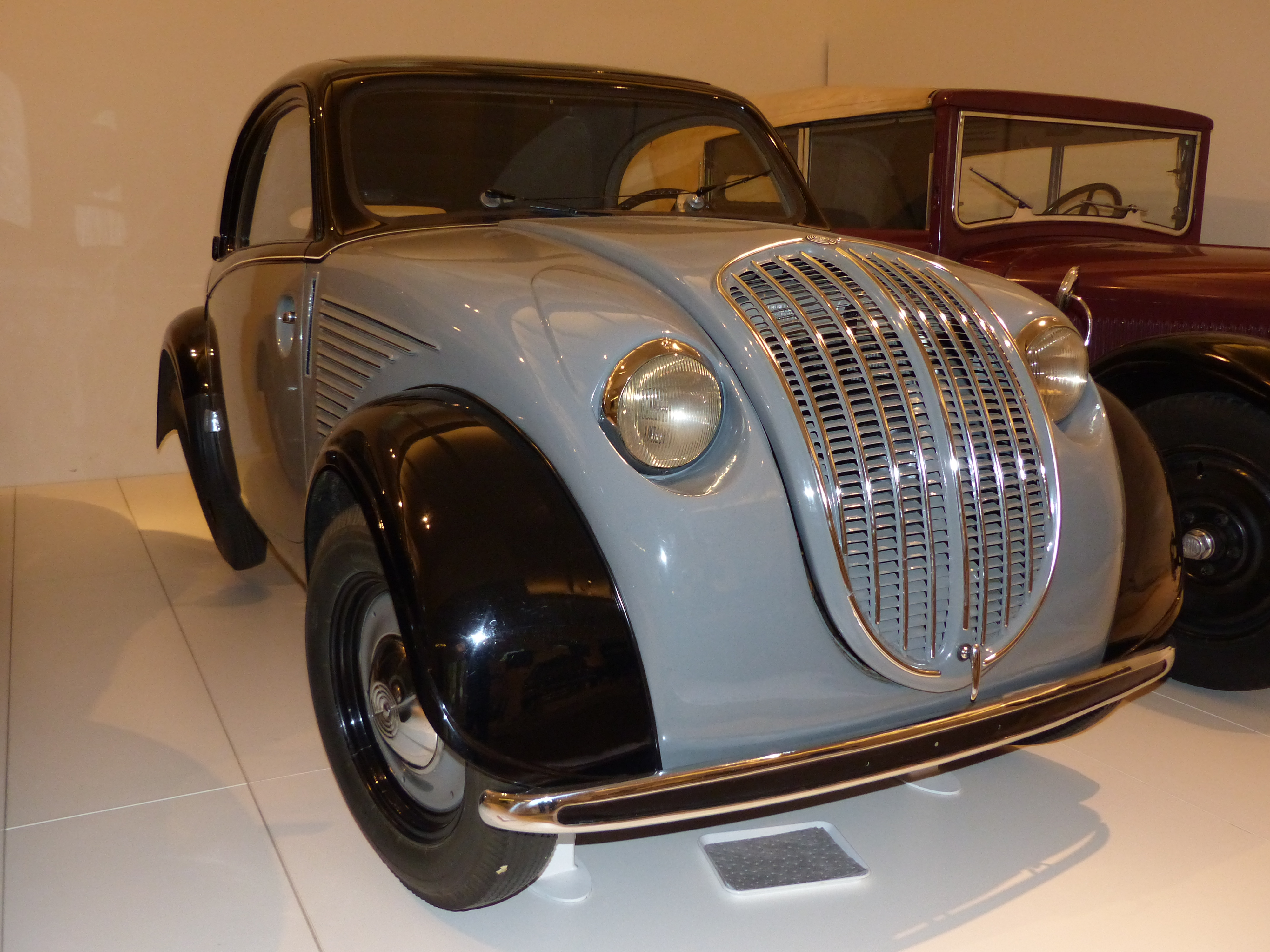 Steyr 55 "Baby", 1938; Exponat im Technischen Museum Wien